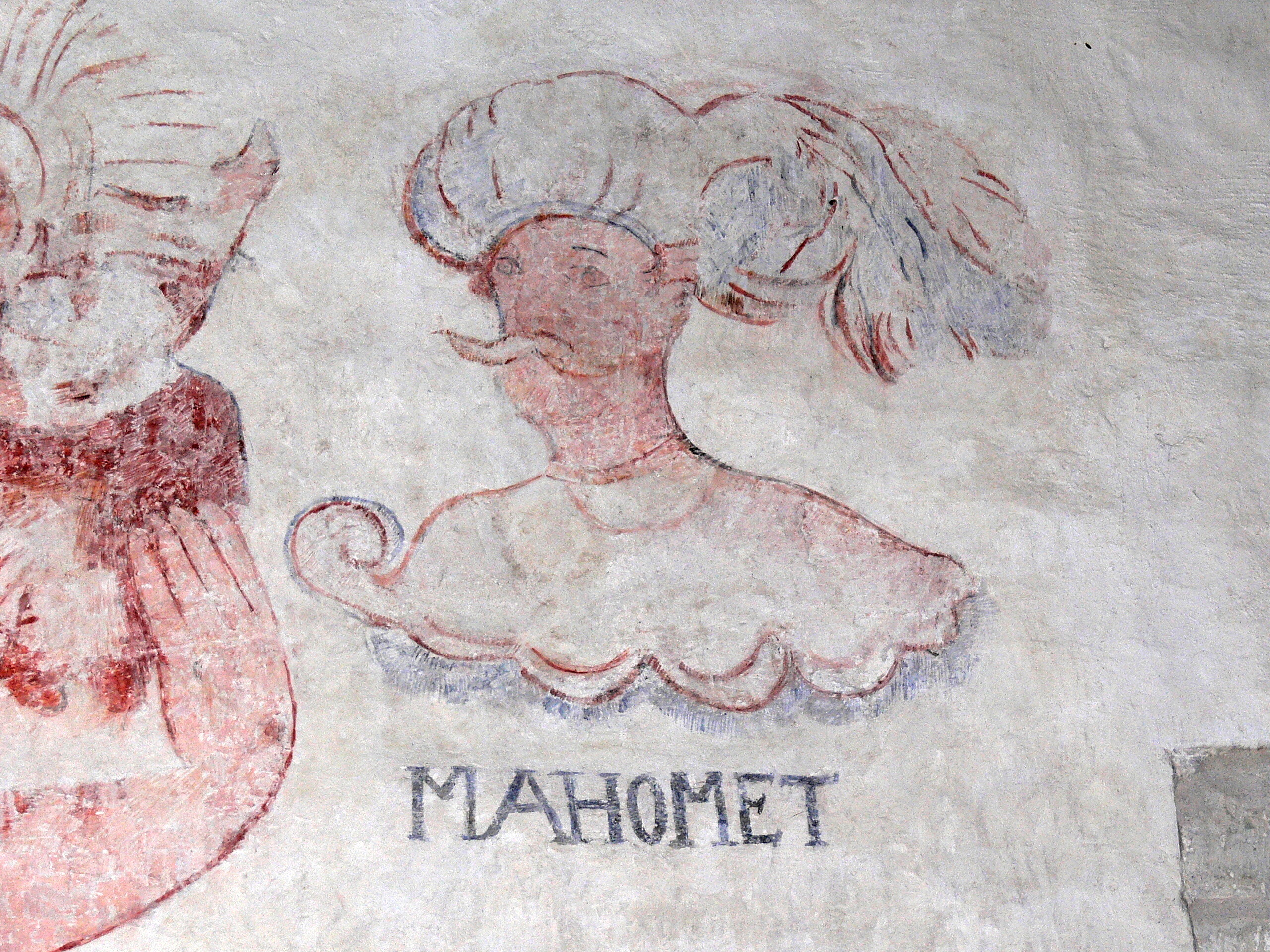 Gothem kyrka auf Gotland. Barocke Wandmalerei - Mohammed als Feind der Kirche